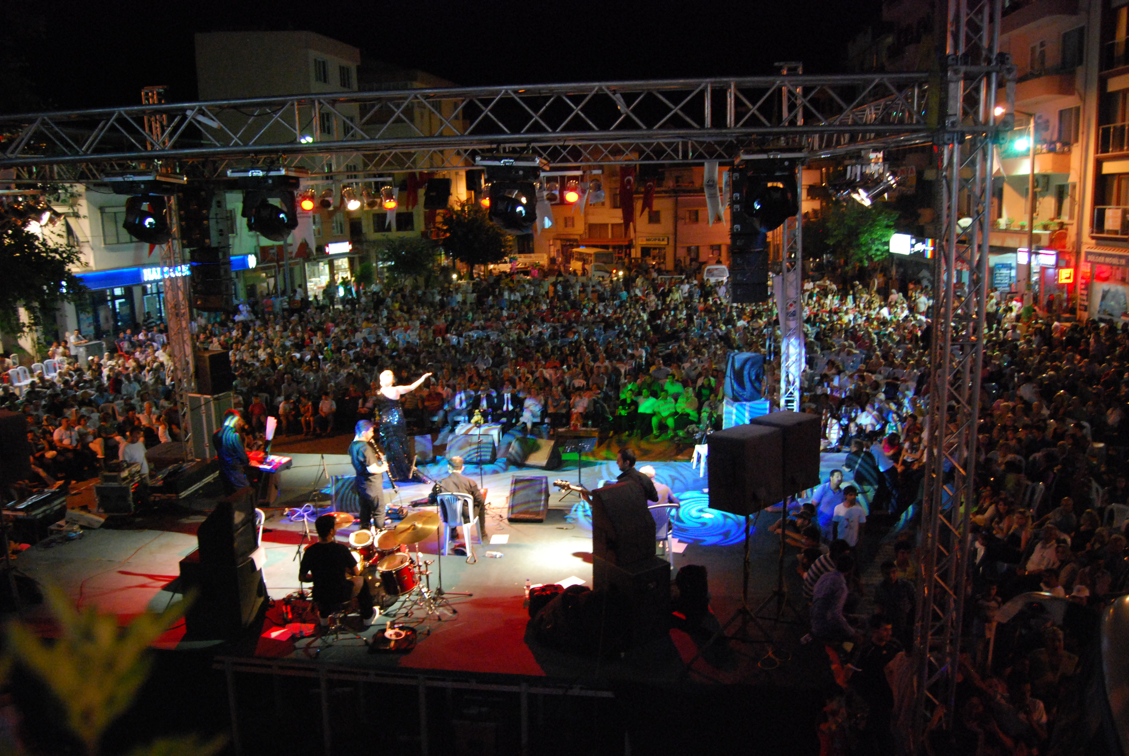 Geleneksel Kiraz Festivalinden Görüntü